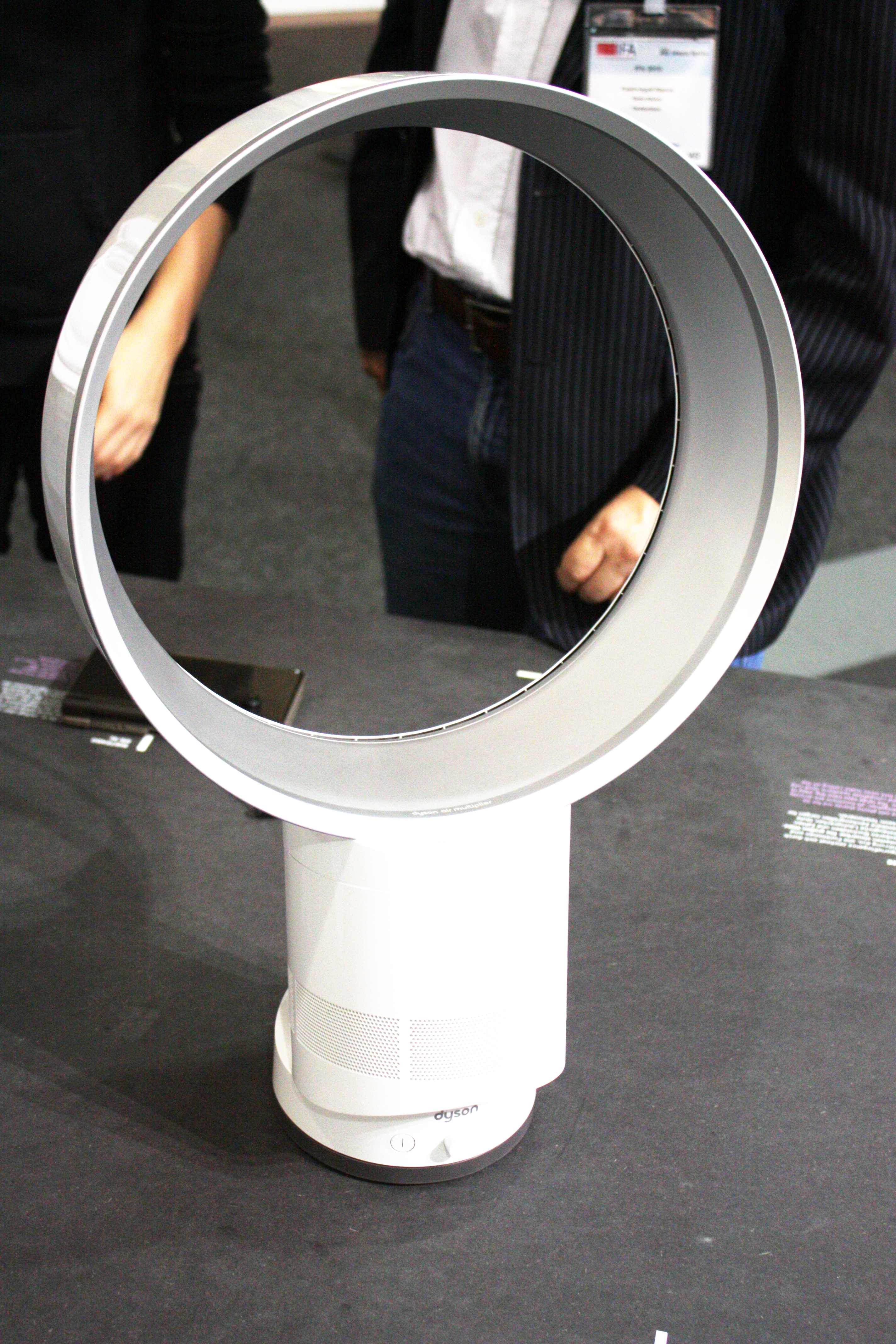 IFA 2010, Berlin